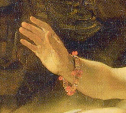 detail 4